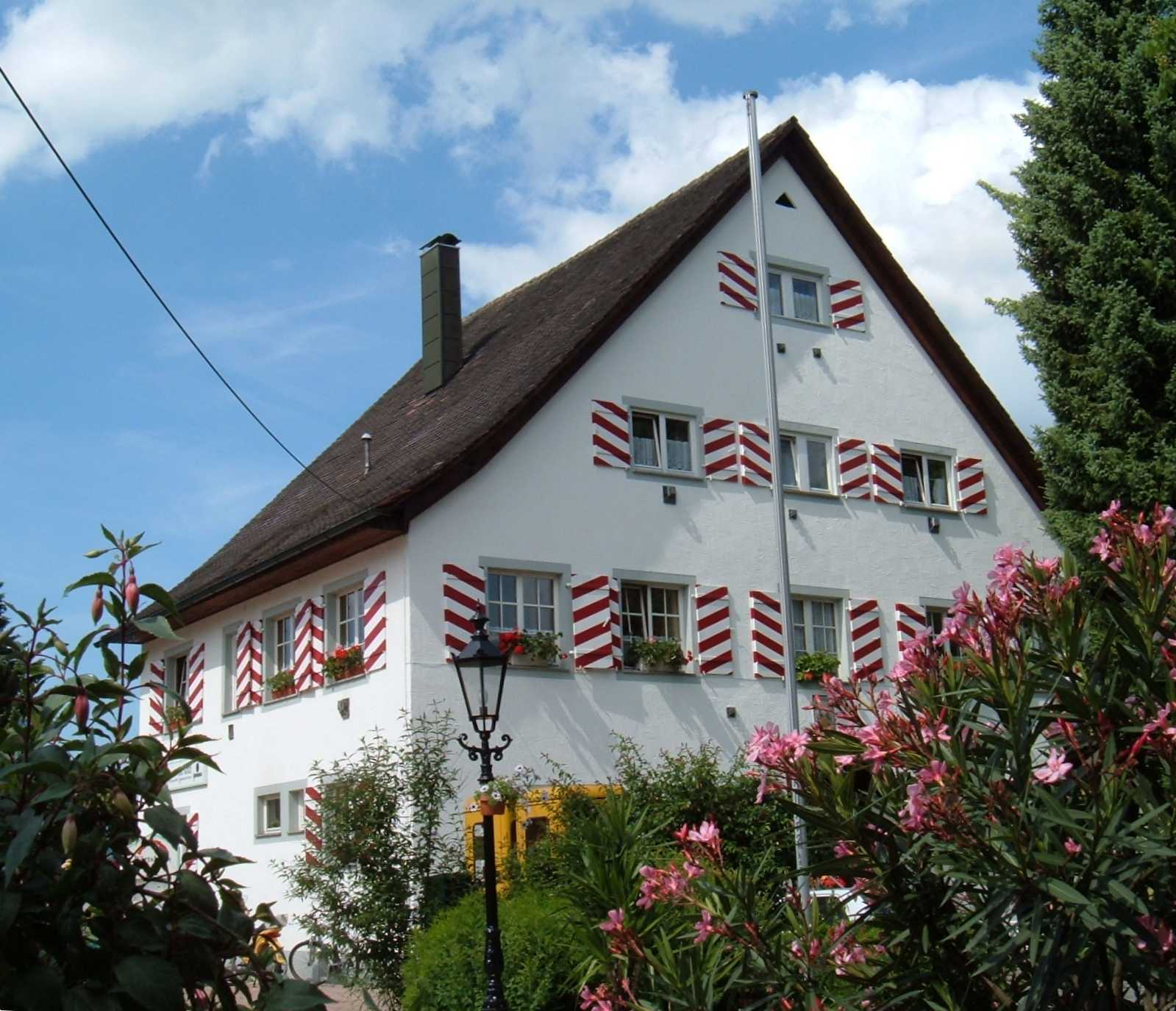 Altes Herrenhaus der Höfe zu Gitzenweiler